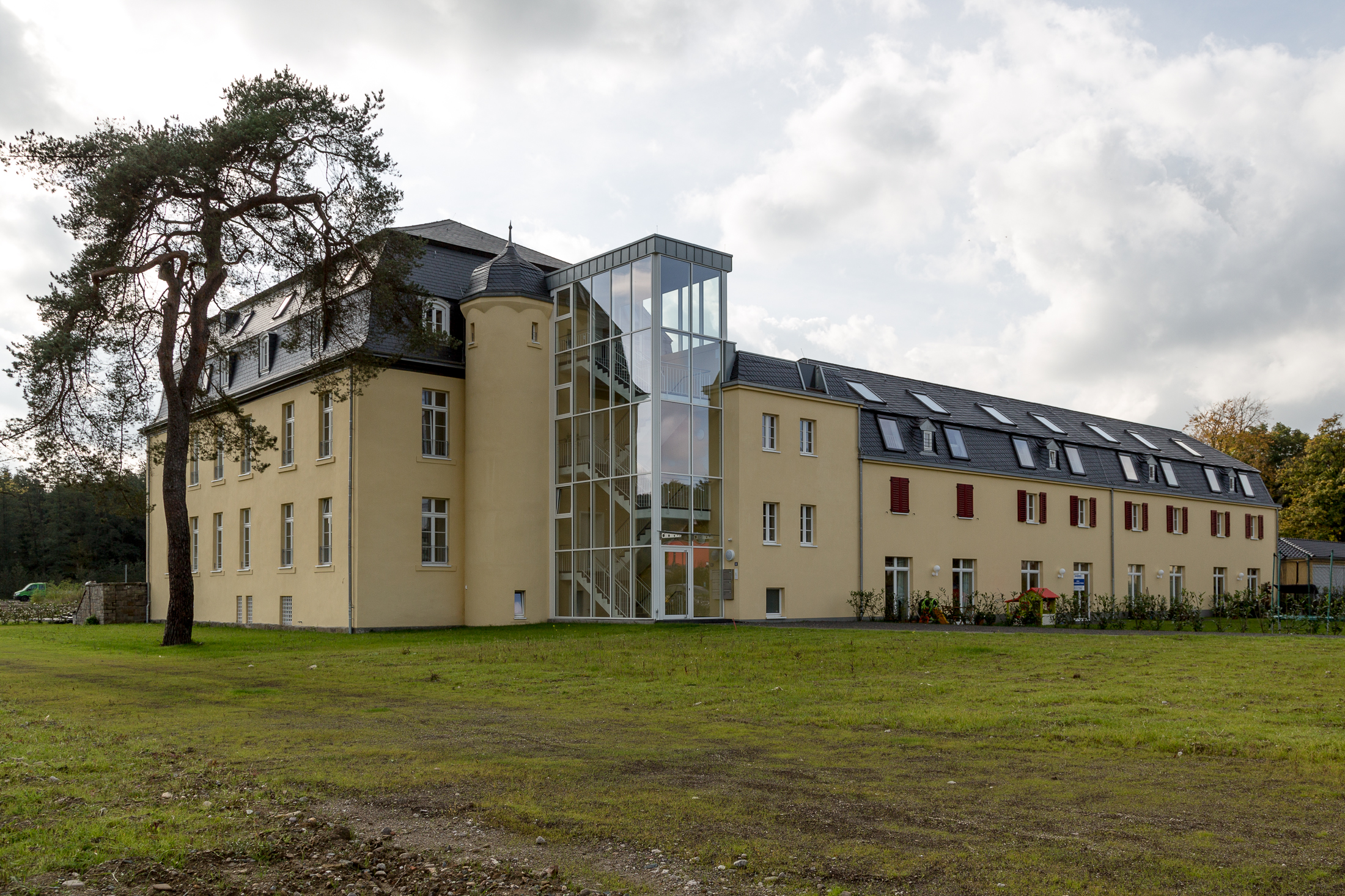 Rösrath, Denkmalnummer 23, Venauen (Haus Venauen) nach der Renovierung